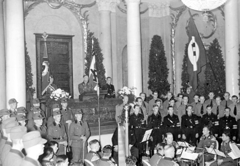 Langemarck-Feier der Berliner Universität Alljährlich begeht am 11. November die Berliner Universität das Gedenken an die bei Langemarck gefallenen Studenten. In der alten Aula der Universität wurden die vom Arbeitsdienst zum Studium übergehenden jungen Studenten feierlich verpflichtet. Während der Ansprache des Generalarbeitsführers Dr. Decker. Scherl Bilderdienst, Berlin 11.11.1936